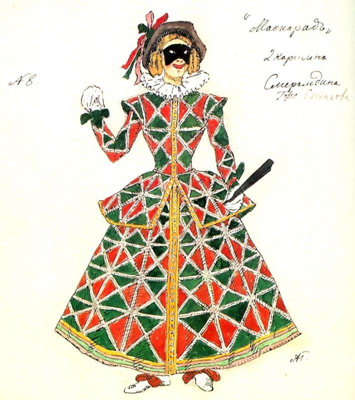 Эскиз к постановке драмы М. Лермонтова «Маскарад»